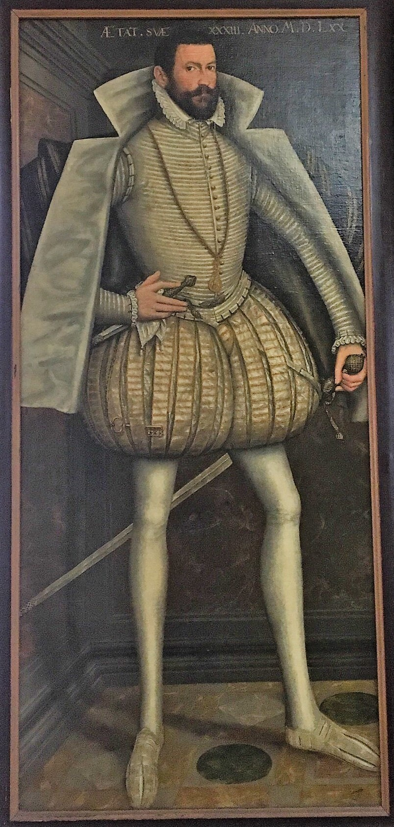 Ladislav III. z Lobkowicz, komorník císaře Ferdinanda I., ve věku 33 let (roku 1570). Autor podobizny: Hans Krell (činný 1525–1586).